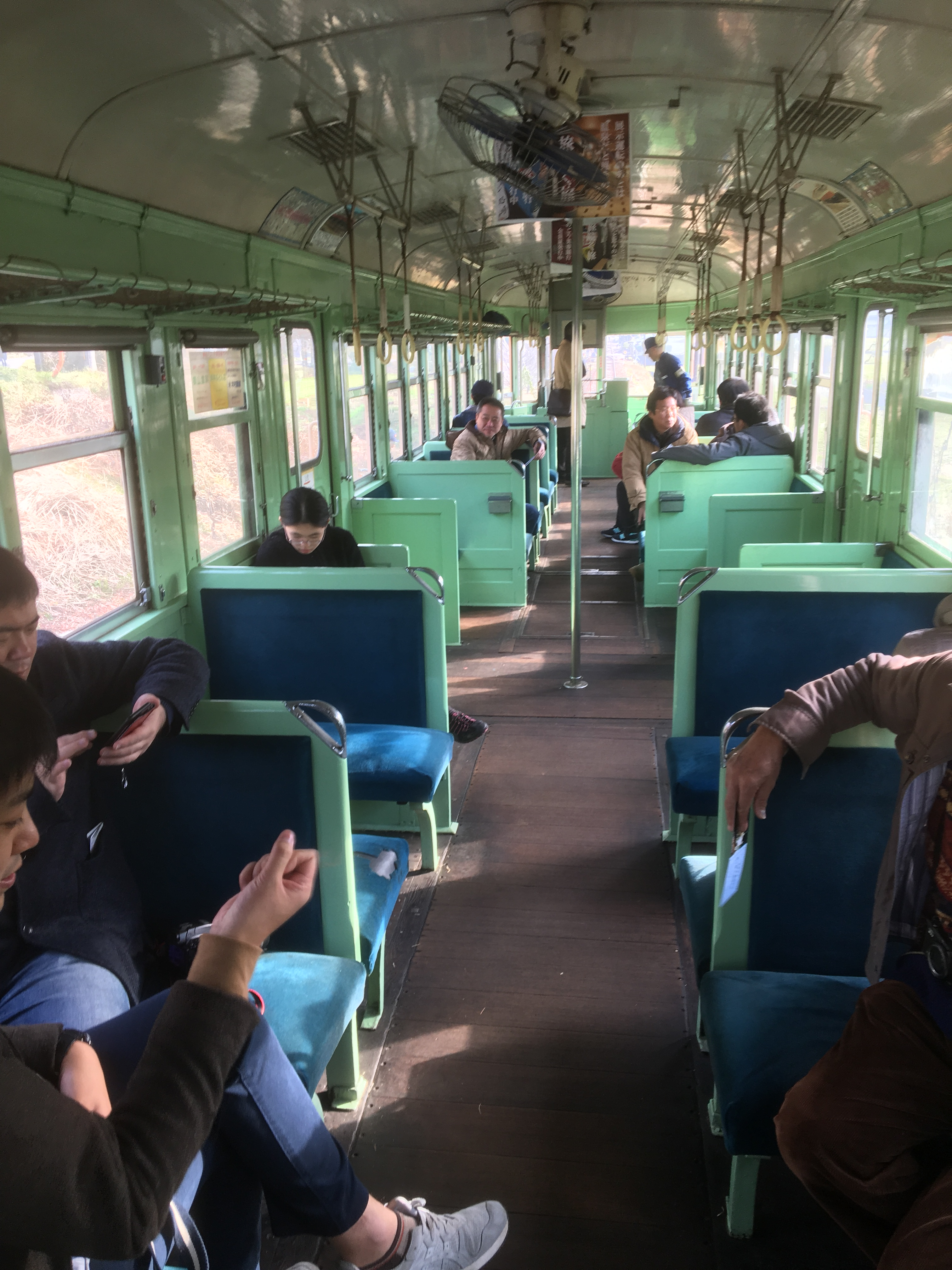 同和鉱業片上鉄道で使用されていたキハ702の車内 柵原ふれあい鉱山公園にて動態保存 月1回の走行会の時の撮影